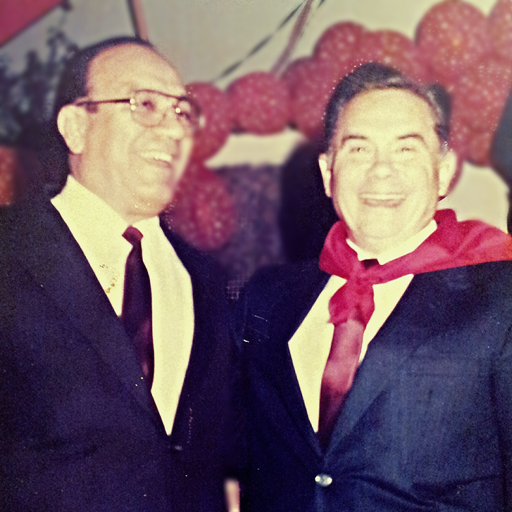 El Dr. Genaro Sanchez junto al Dr. Luis maría Argaña, Presidente del Partido Colorado en el aniversario de fundación de la ANR. Casa de los Colorados.